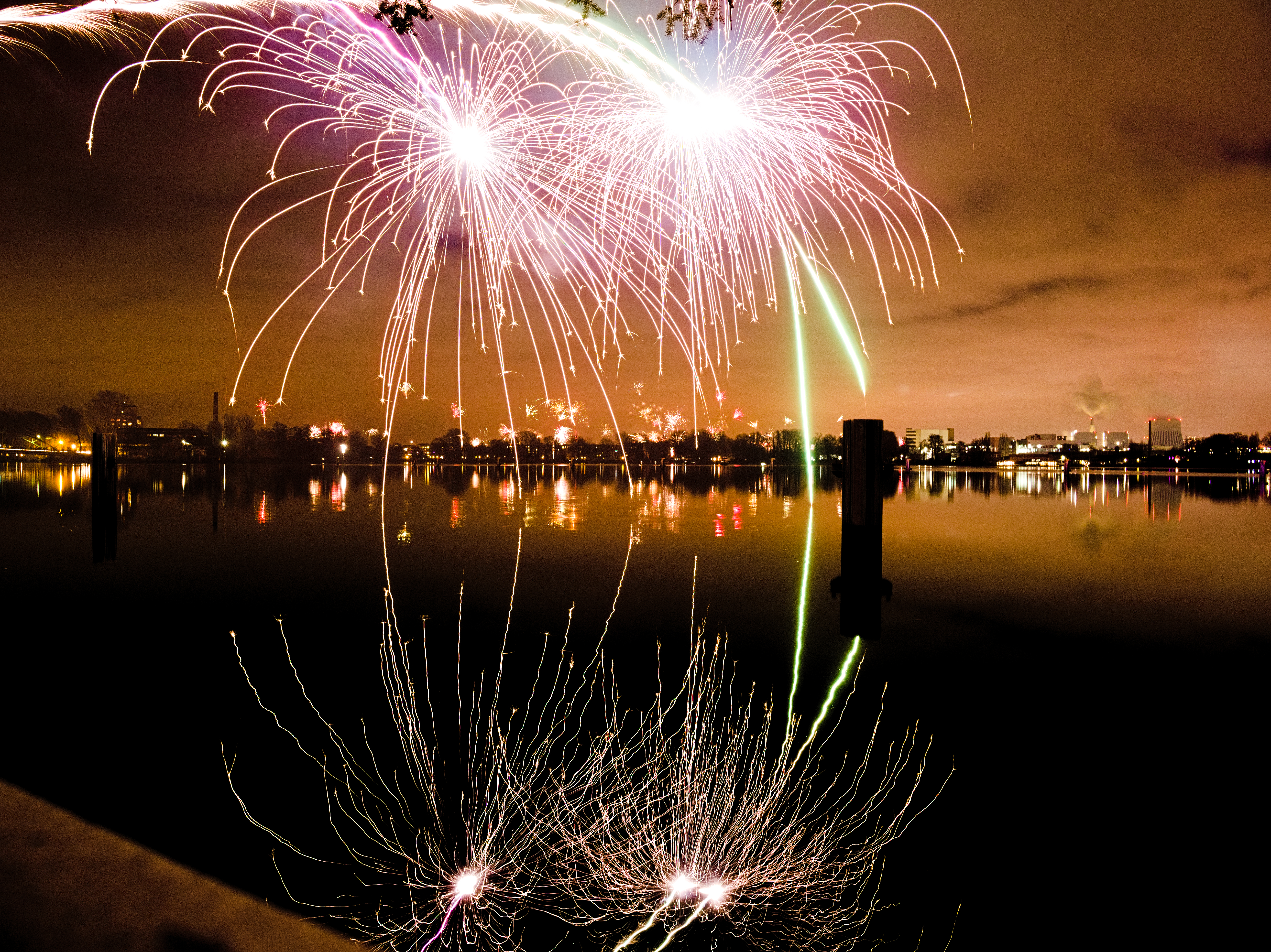 Neujahrsfeuerwerke 2020 und Feiern zum 1. Januar 2020 in Berlin-Spandau an der Havel.